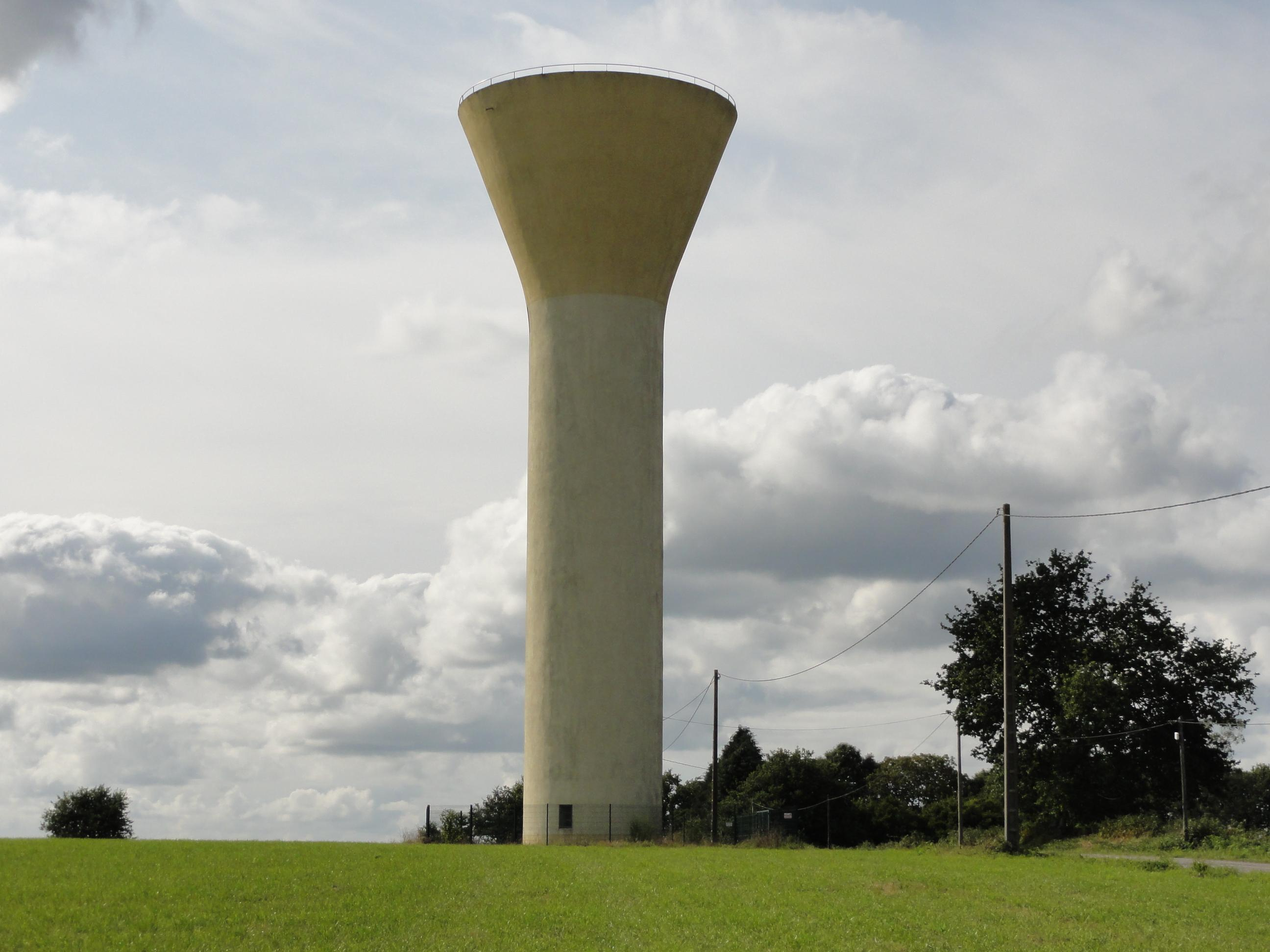 château d'eau, commune de Priziac, département du Morbihan, France